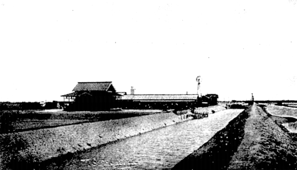 臺灣總督府水產試驗場台南支場全景，位於台南市安平